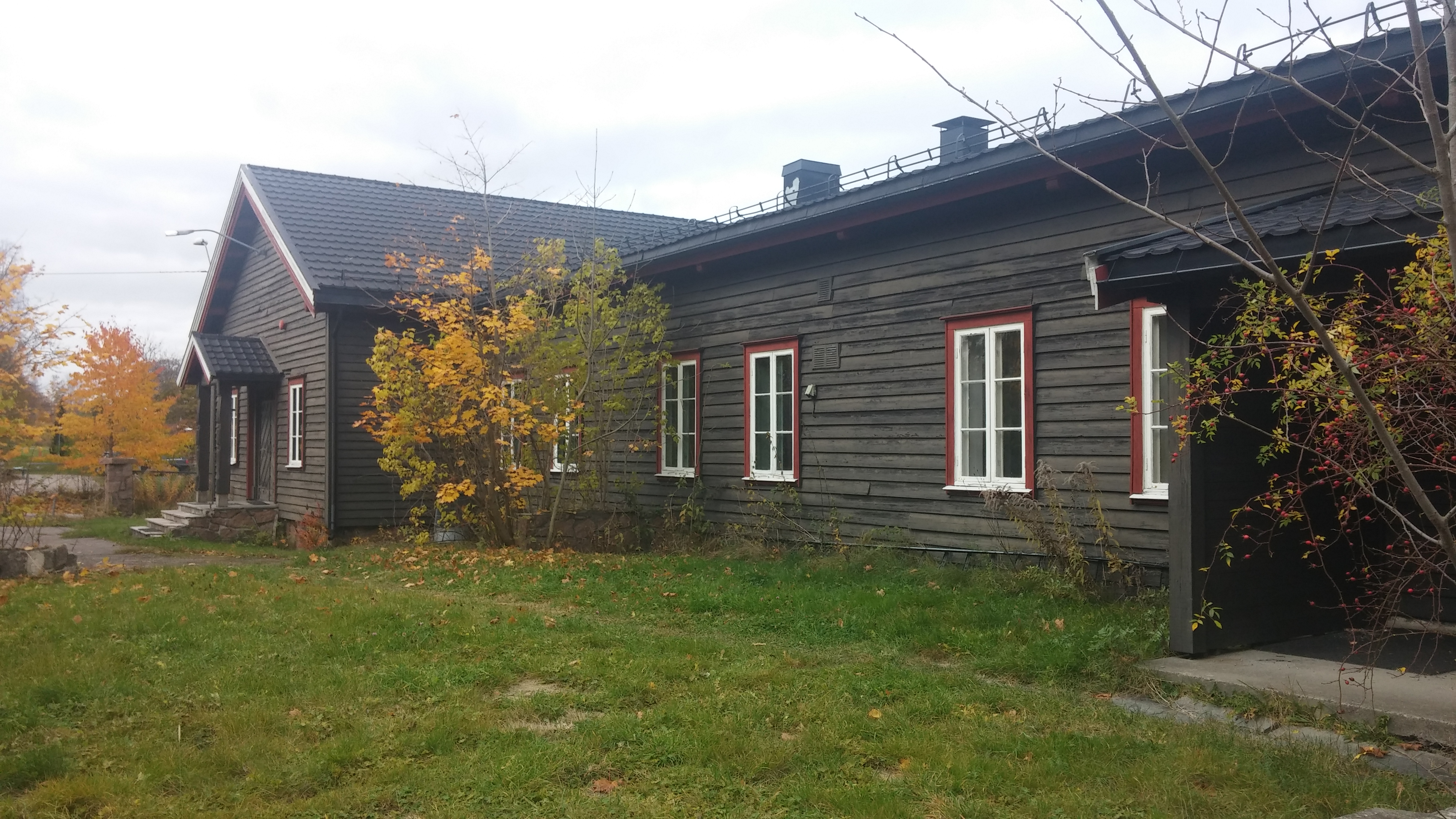 Offisersmessen Casino i Grefsrudleiren ved Holmestrand, bygget av tyskerne under andre verdenskrig, også benyttet til utdannelse av frontkjempere og hirdens vaktmannskaper til fangeleire